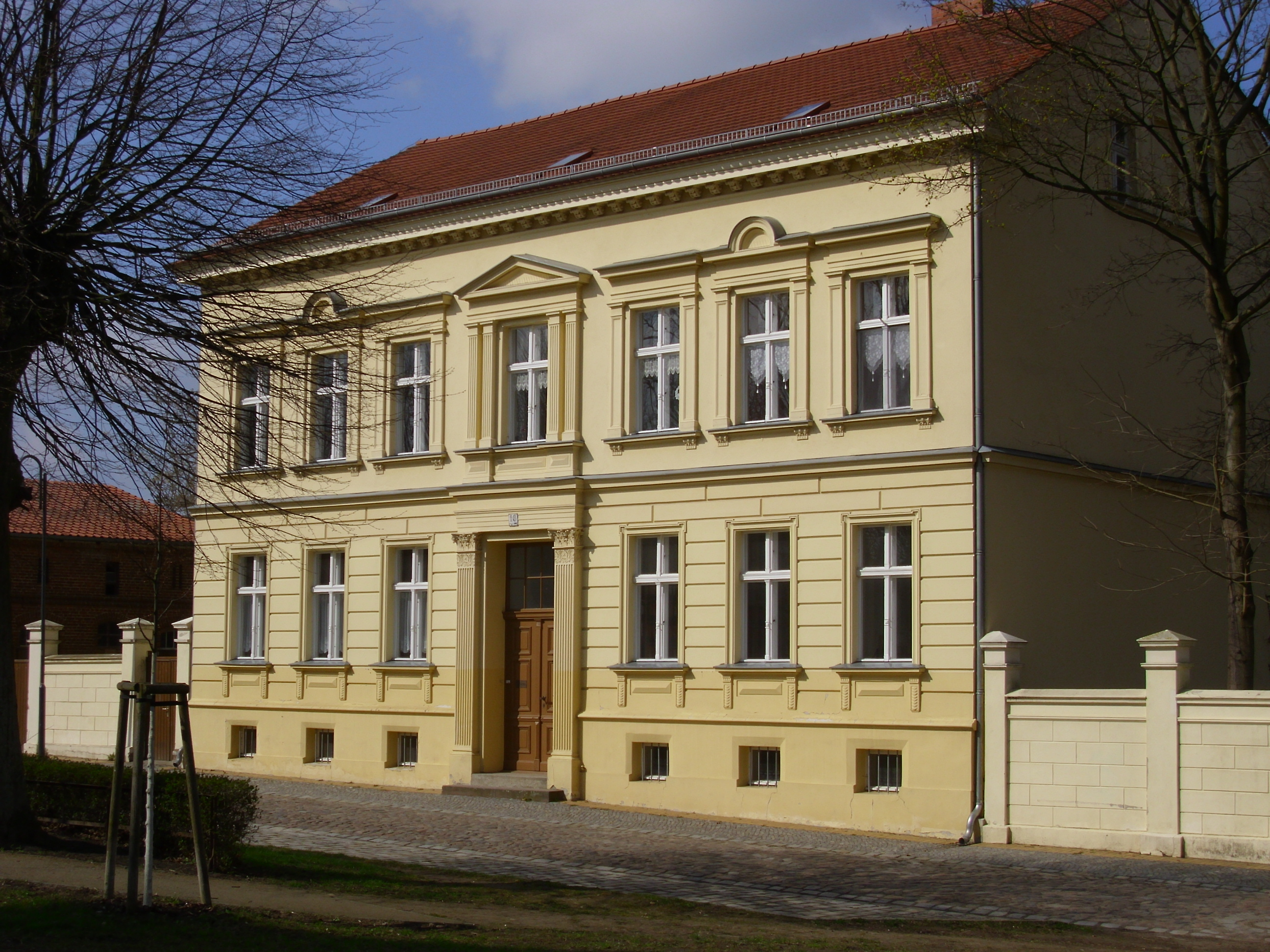 Pfarrhaus in der Berliner Str.16 in Altlandsberg, denkmalgeschützt